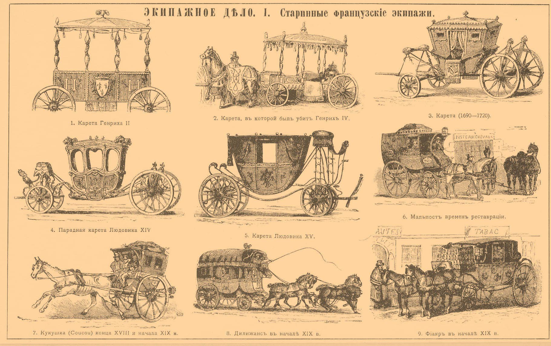 Иллюстрация к статье Экипажное дело из энциклопедии Брокгауза и Ефрона